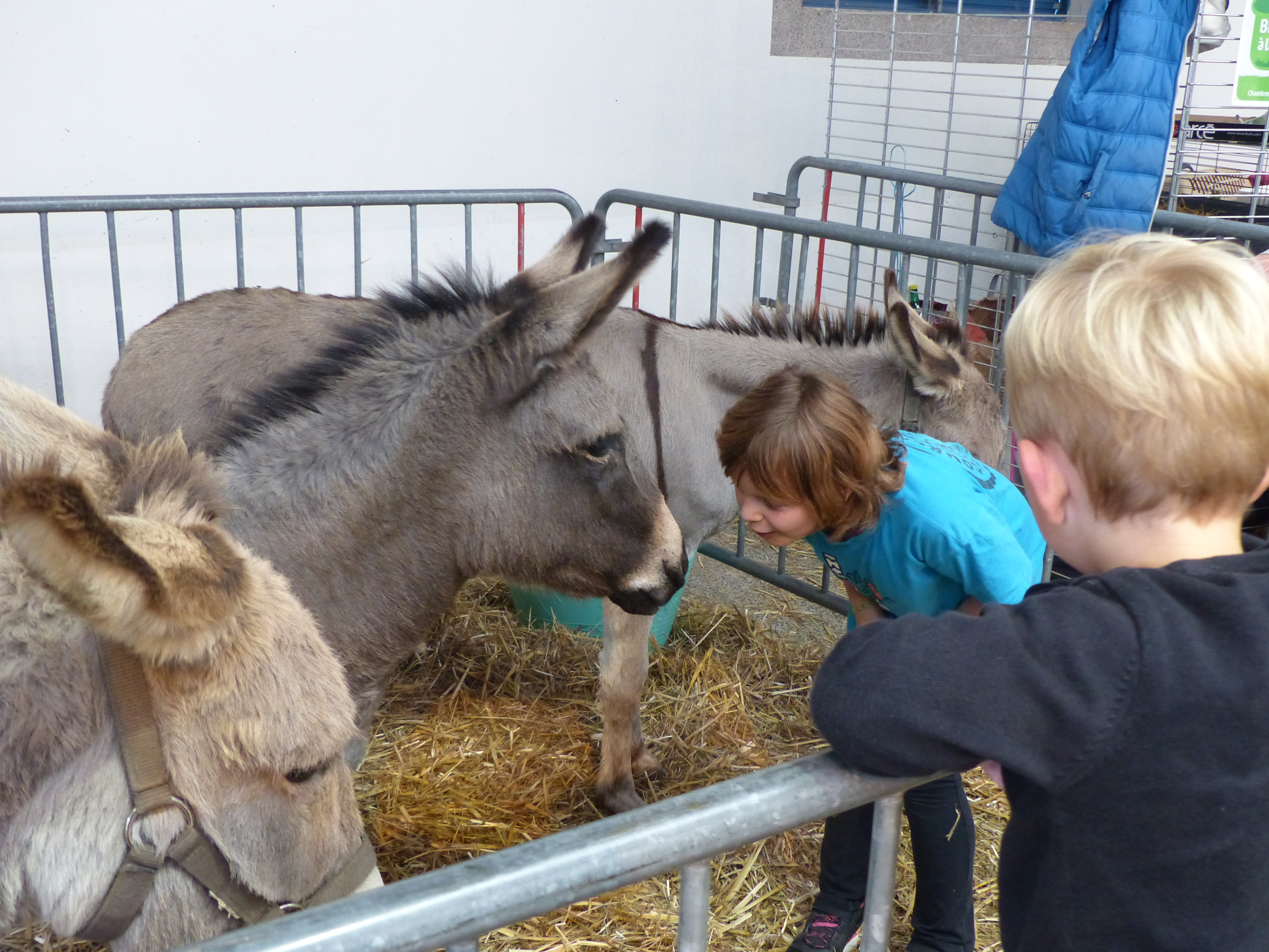 Asinothérapie à l'édition 2017 du concours agricole bovin et équin Ohh la Vache à Pontivy, Bretagne, France